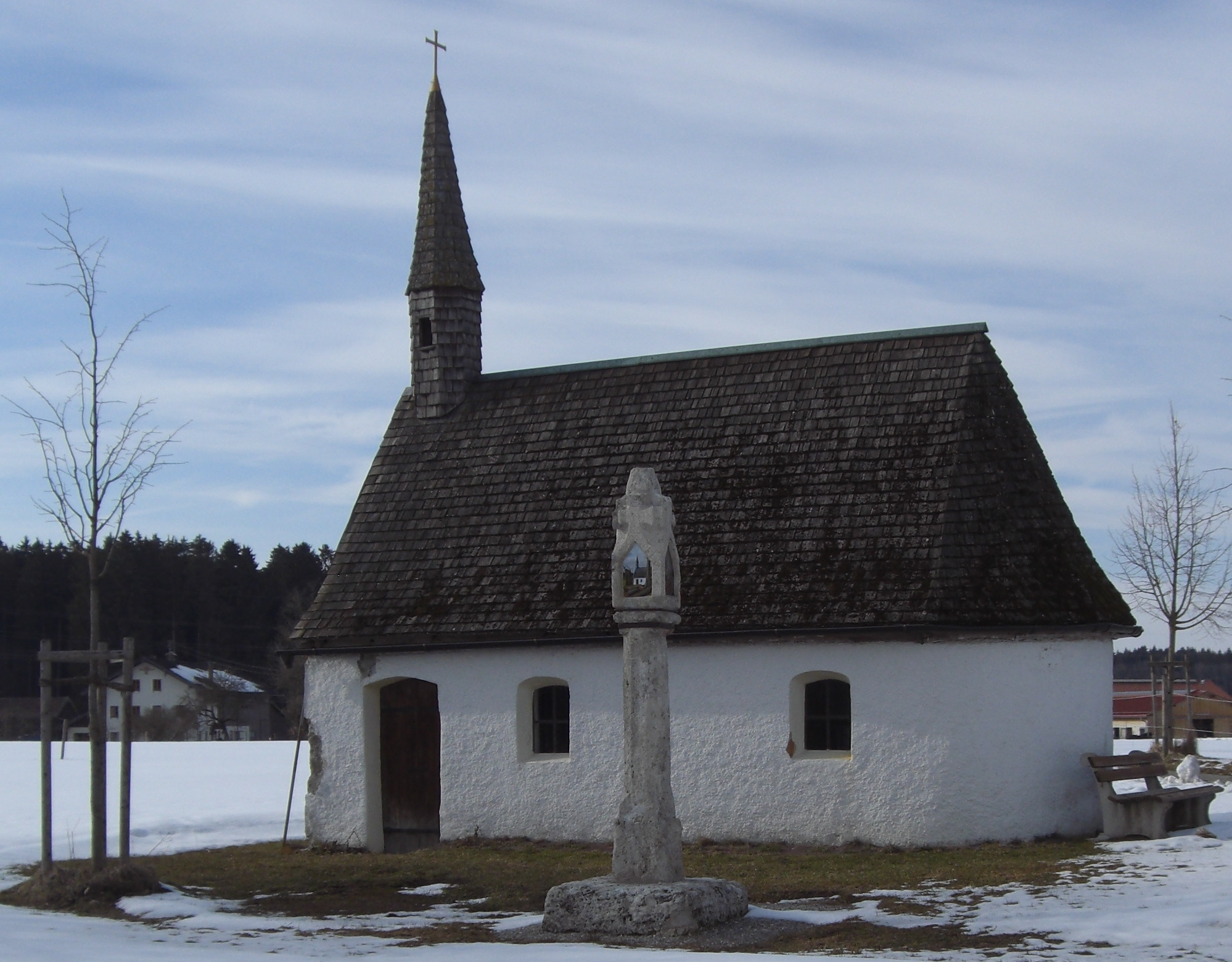 Kapelle in Palnkam, Otterfing, Oberbayern